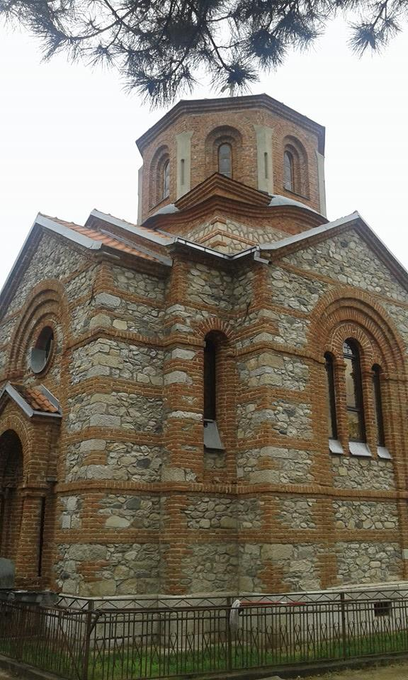 Chrurch Archangel Gavril, Bitola